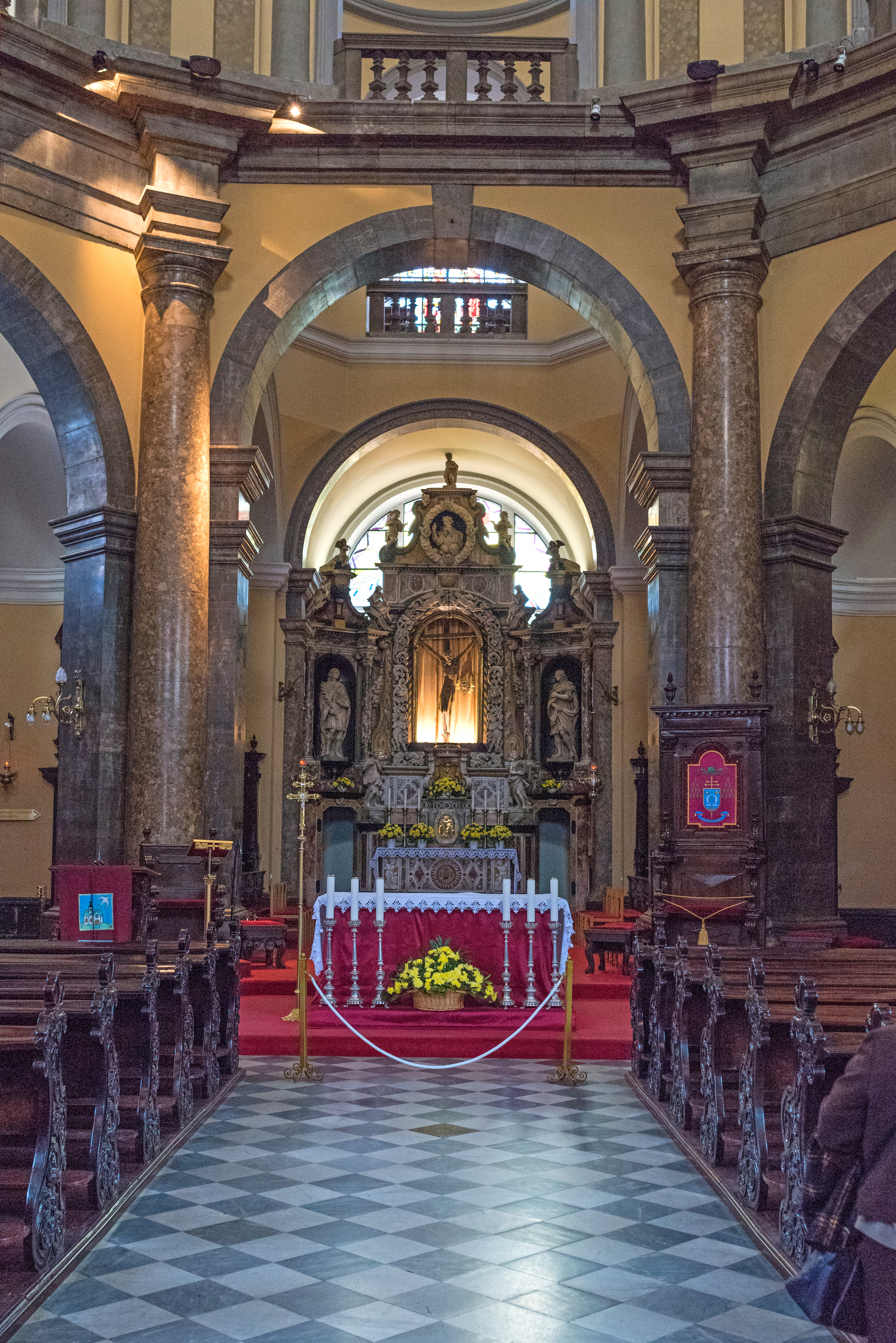 Rijeka Croatia November 2017